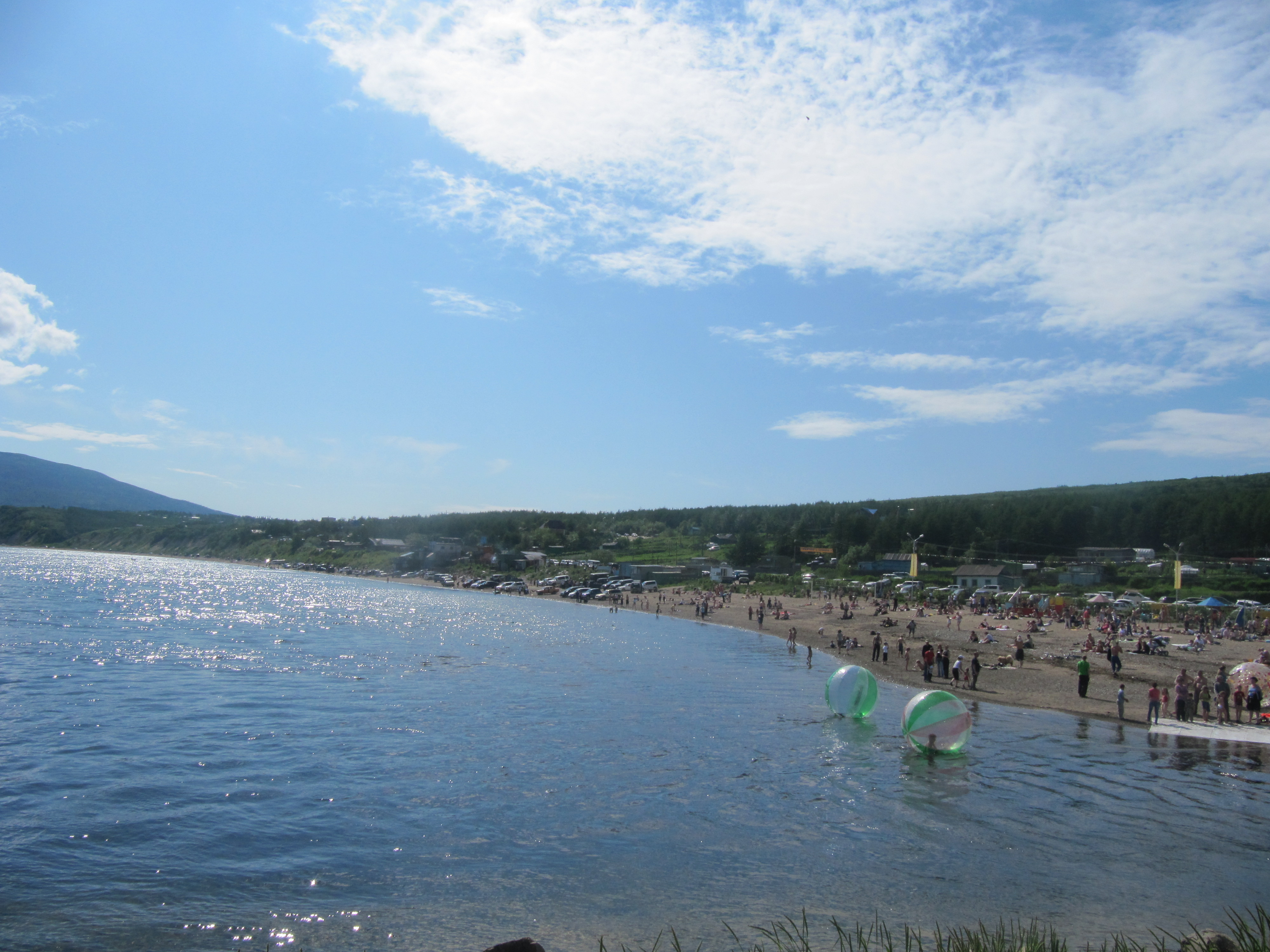 Magadan beach